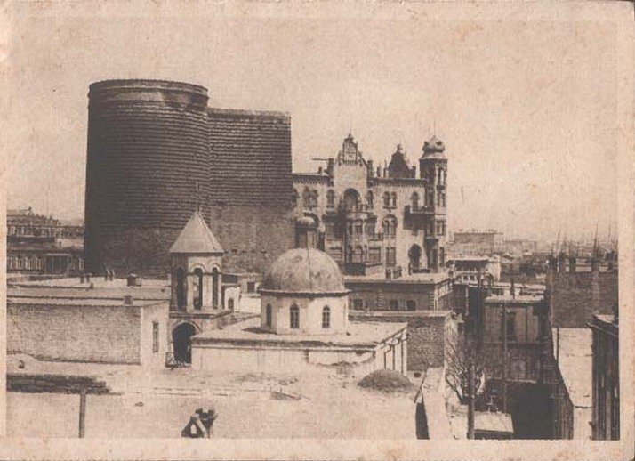 Девичья башня. Баку, 1930-х